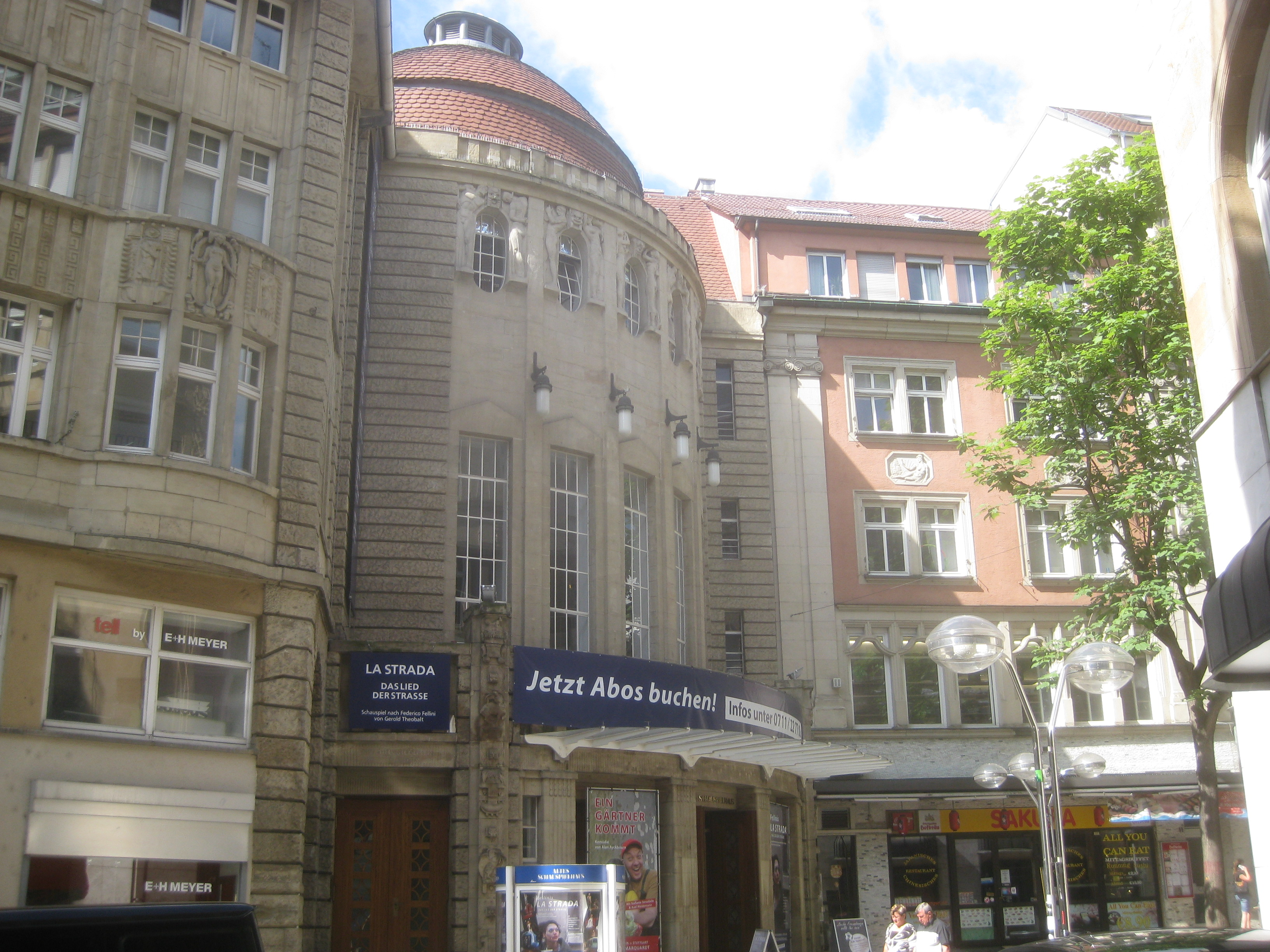 Altes Schauspielhaus in Stuttgart, Kleine Königstraße 7-9; erbaut 1909 nach Entwurf der Stuttgarter Architekten Albert Eitel und Eugen Steigleder; 1946-1962 Interimsbühne des Stuttgarter Staatstheaters